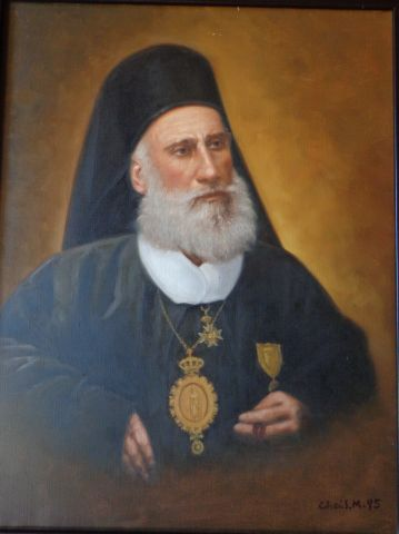 Μητροπολίτης Θηβών και Λεβαδείας